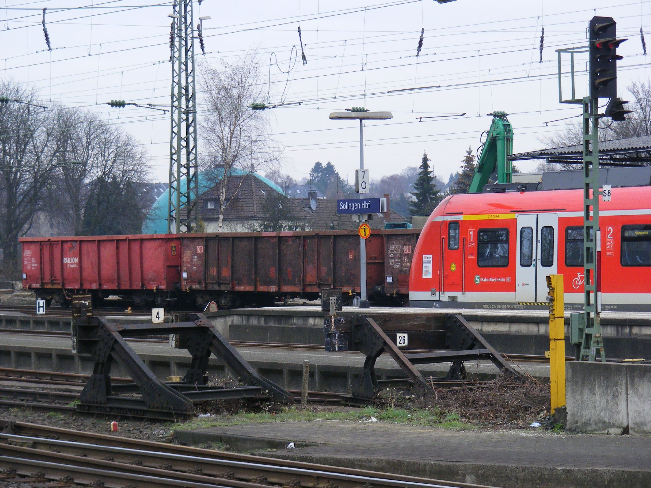 Solingen Hauptbahnhof, Solingen-Ohligs, hinten Kugelgasbehälter